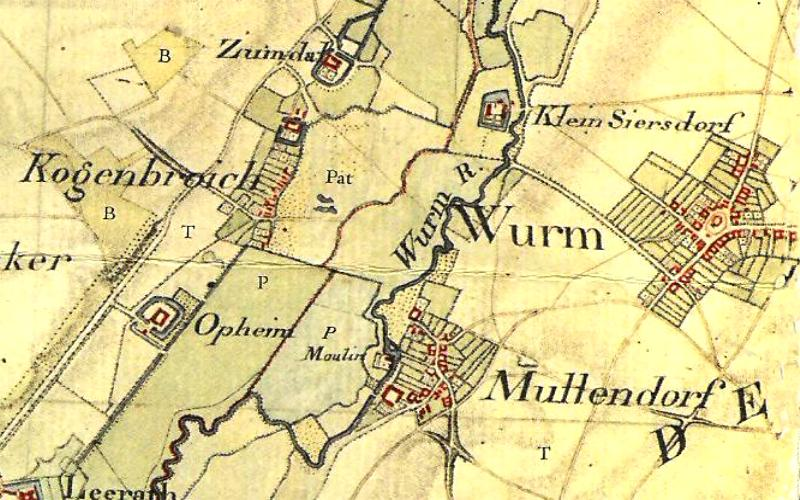 Kartenaufnahme der Rheinlande 1803-1820